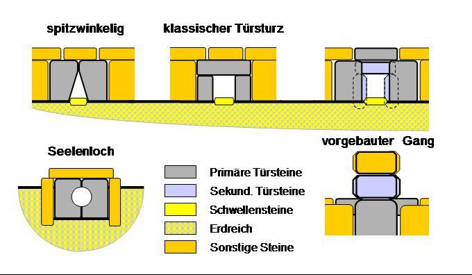 Dolmenzugang